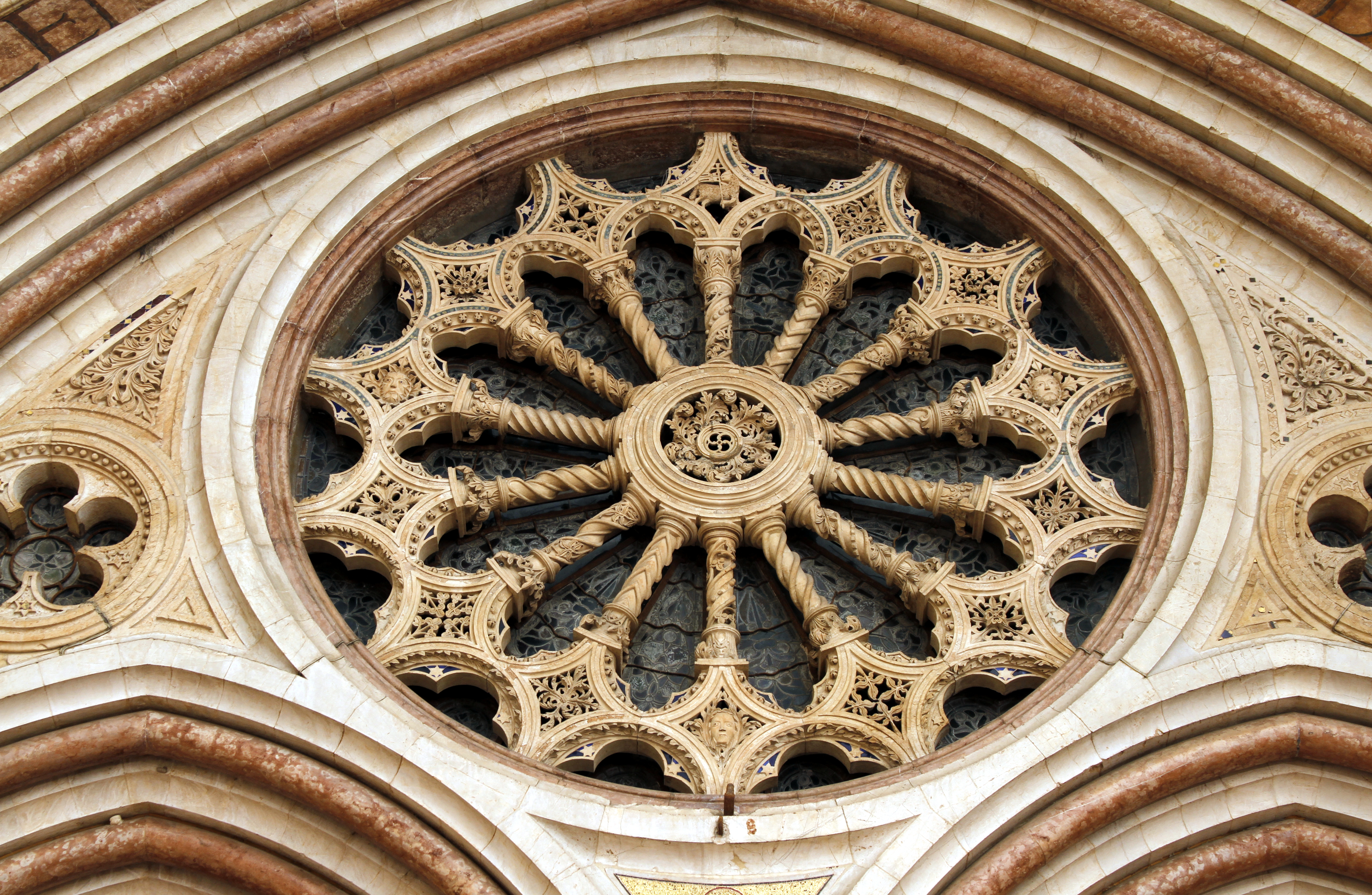 Basilica di San Francesco - Assisi